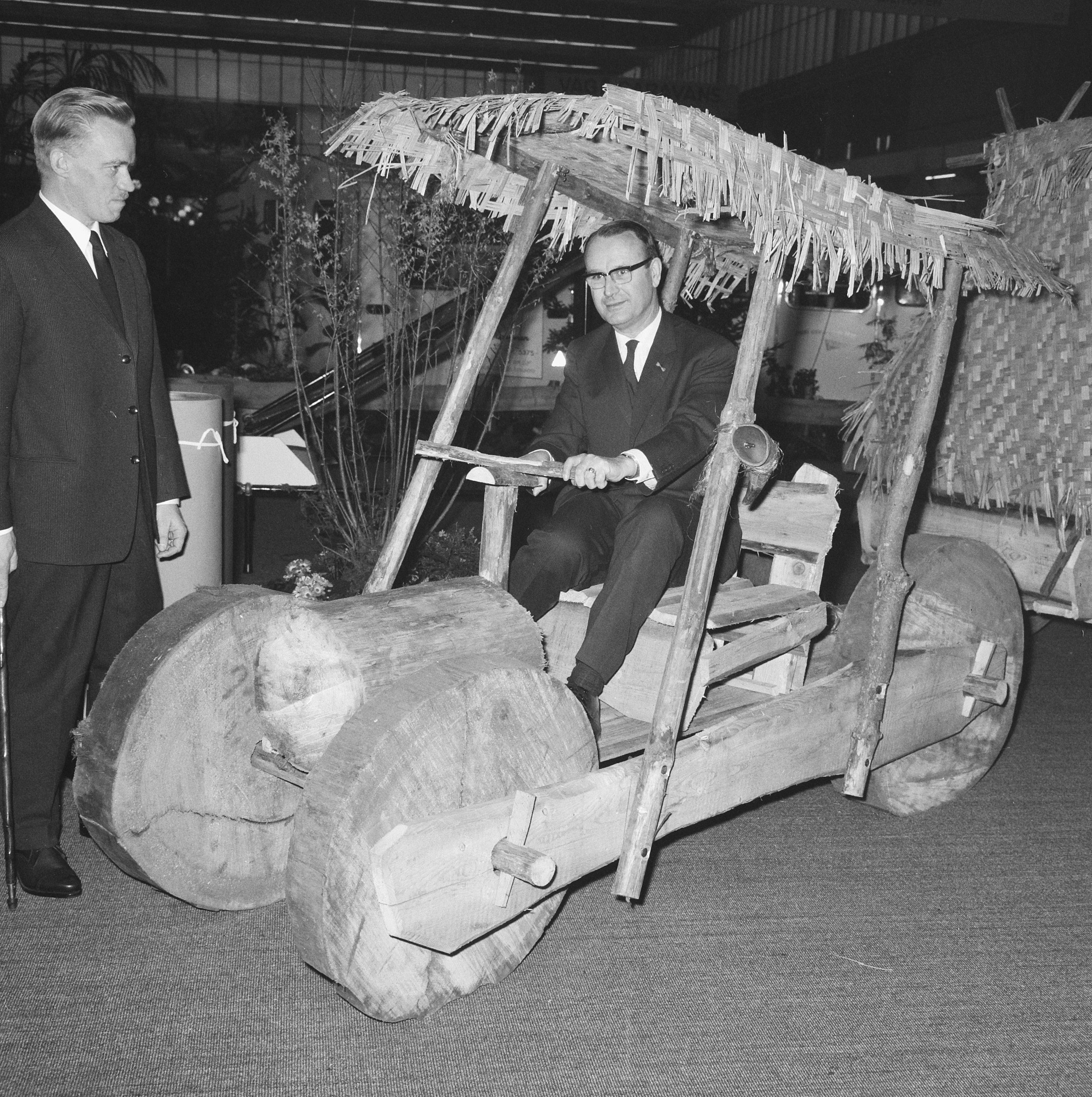 Collectie / Archief : Fotocollectie Anefo Reportage / Serie : [ onbekend ] Beschrijving : Mr. F. J. Kranenburg ( Commissaris Koningin in Noord Holland ) caravantentoonstelling in RAI rondgang Datum : 29 januari 1965 Locatie : Amsterdam, Noord-Holland Trefwoorden : rondgangen Persoonsnaam : Flintstone Car, Kranenburg, F.J. Fotograaf : Nijs, Jac. de / Anefo Auteursrechthebbende : Nationaal Archief Materiaalsoort : Negatief (zwart/wit) Nummer archiefinventaris : bekijk toegang 2.24.01.03 Bestanddeelnummer : 917-3862